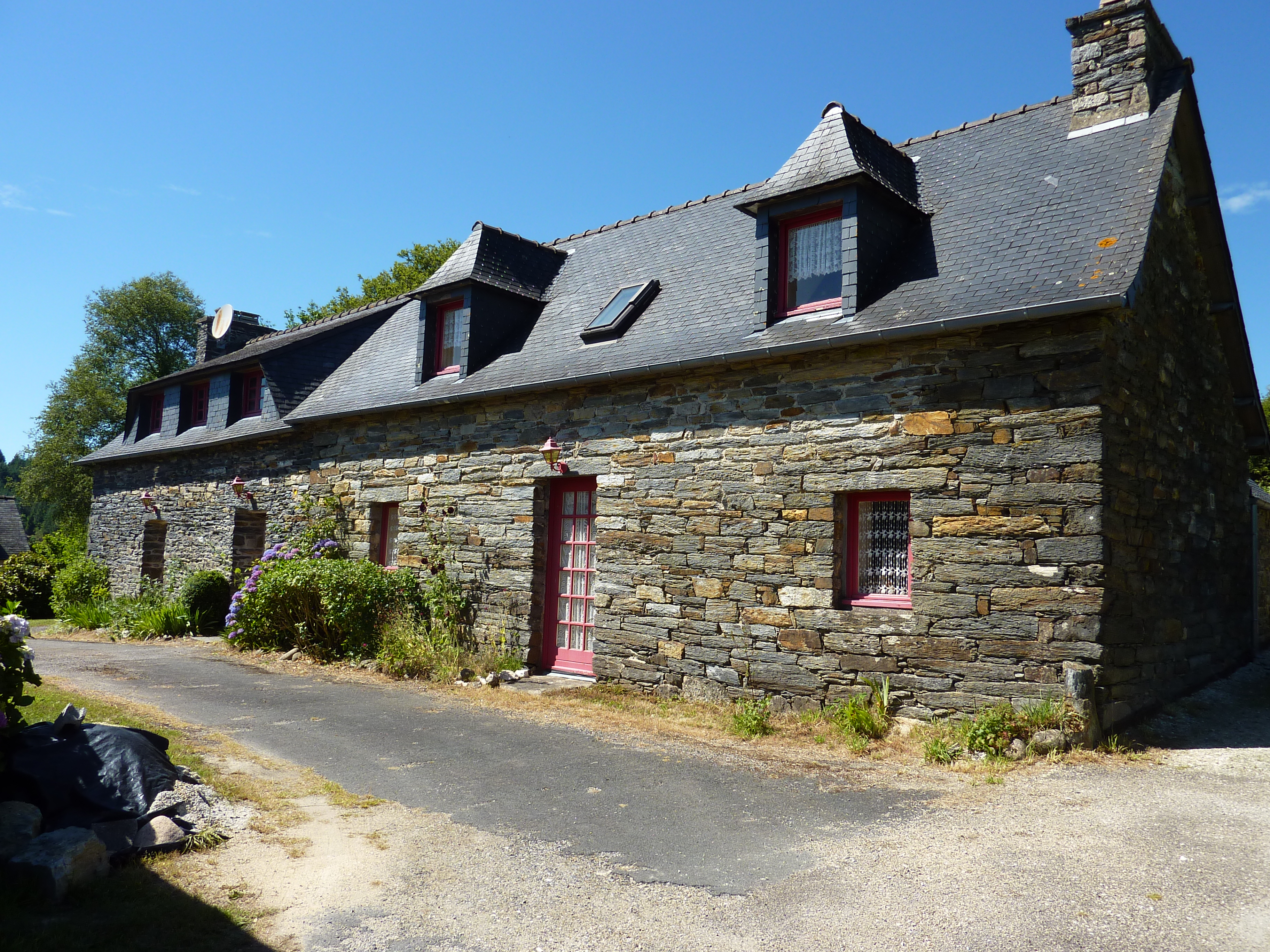 Saint-Rivoal: bourg, longère rénovée